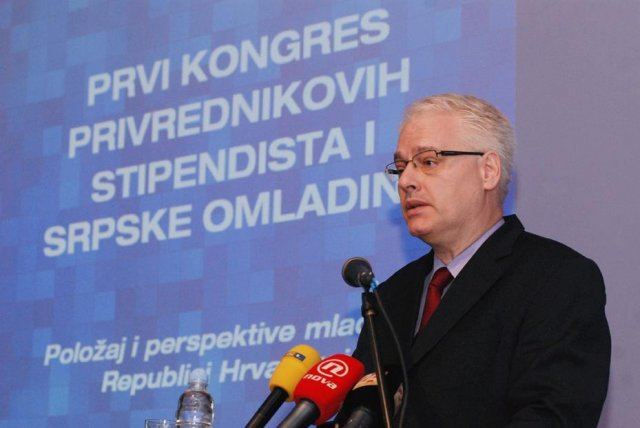 Председник Р. Хрватске Иво Јосиповић приликом говора на Првом конгресу Привредникових стипендиста и српске омладине у Загребу